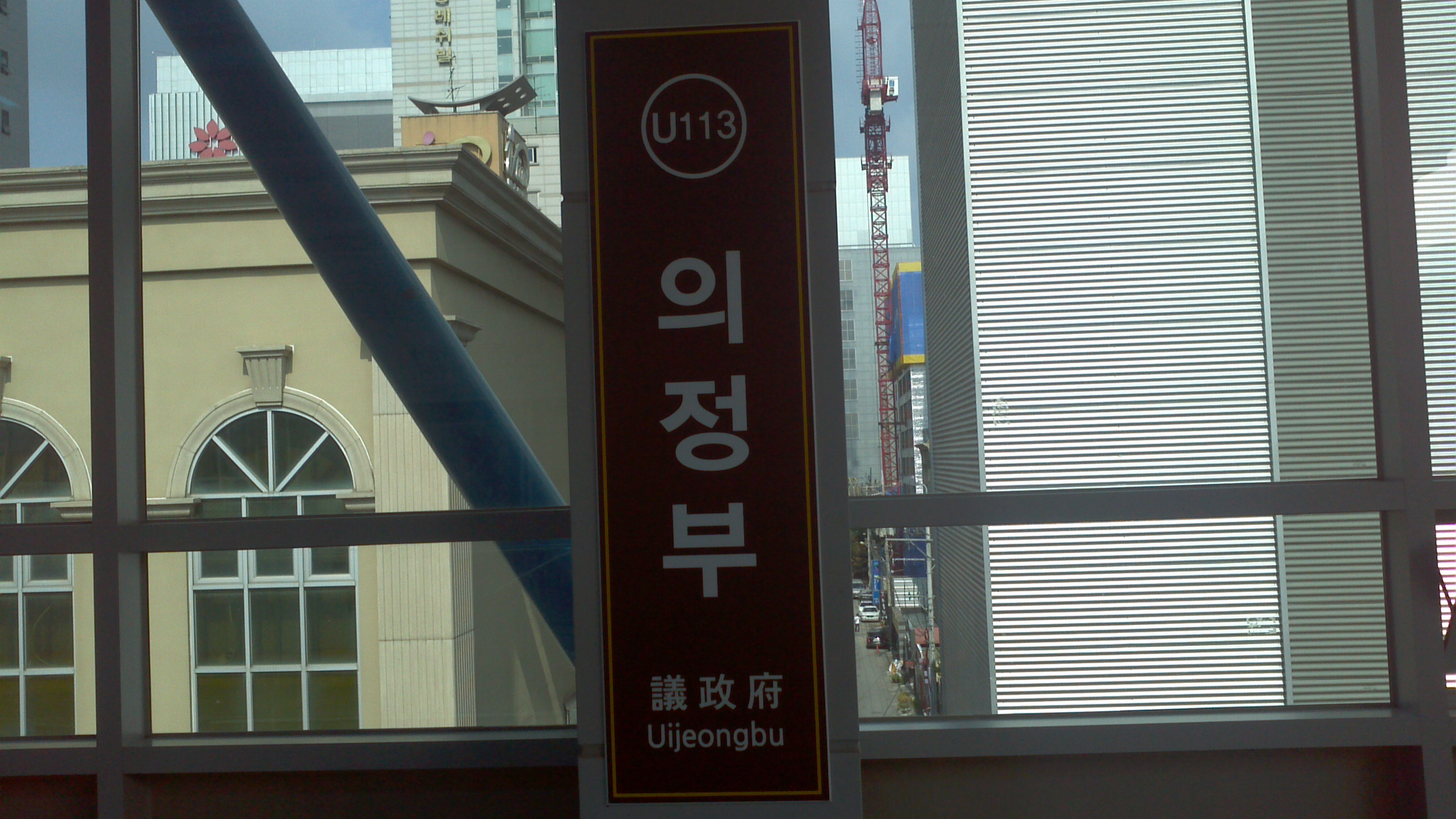 경전철의정부역 역명판